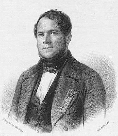 "A. RECURT, né à Lasalles (Hautes-Pyrénées) le 9 juin 1798, ancien ministre et préfet de la Seine."